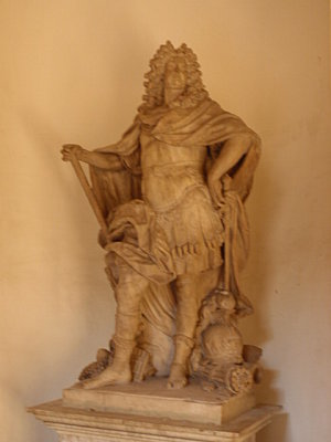 Statue du maréchal de Villars